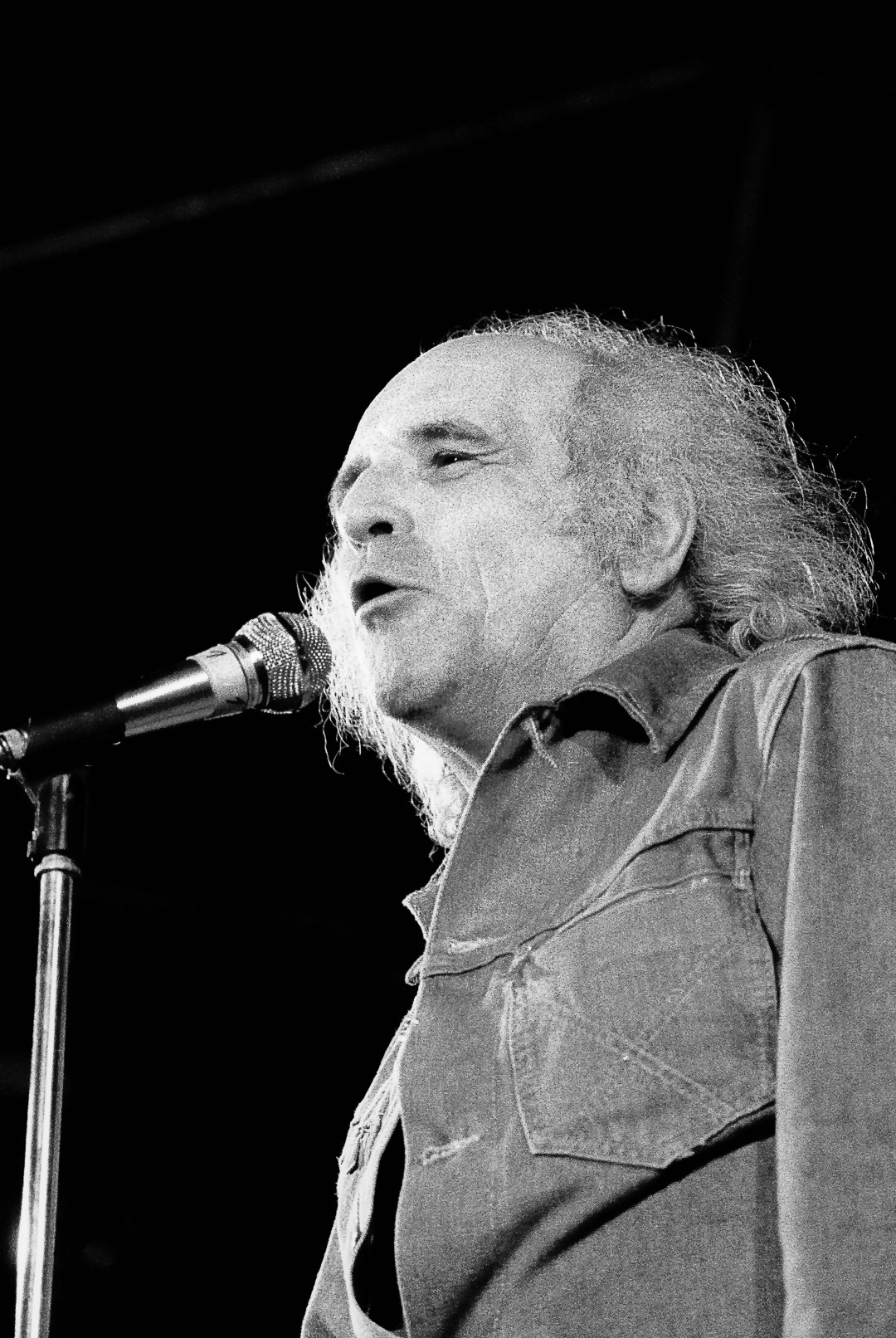 Léo Ferré, Fête du PSU, Colombes, 1973